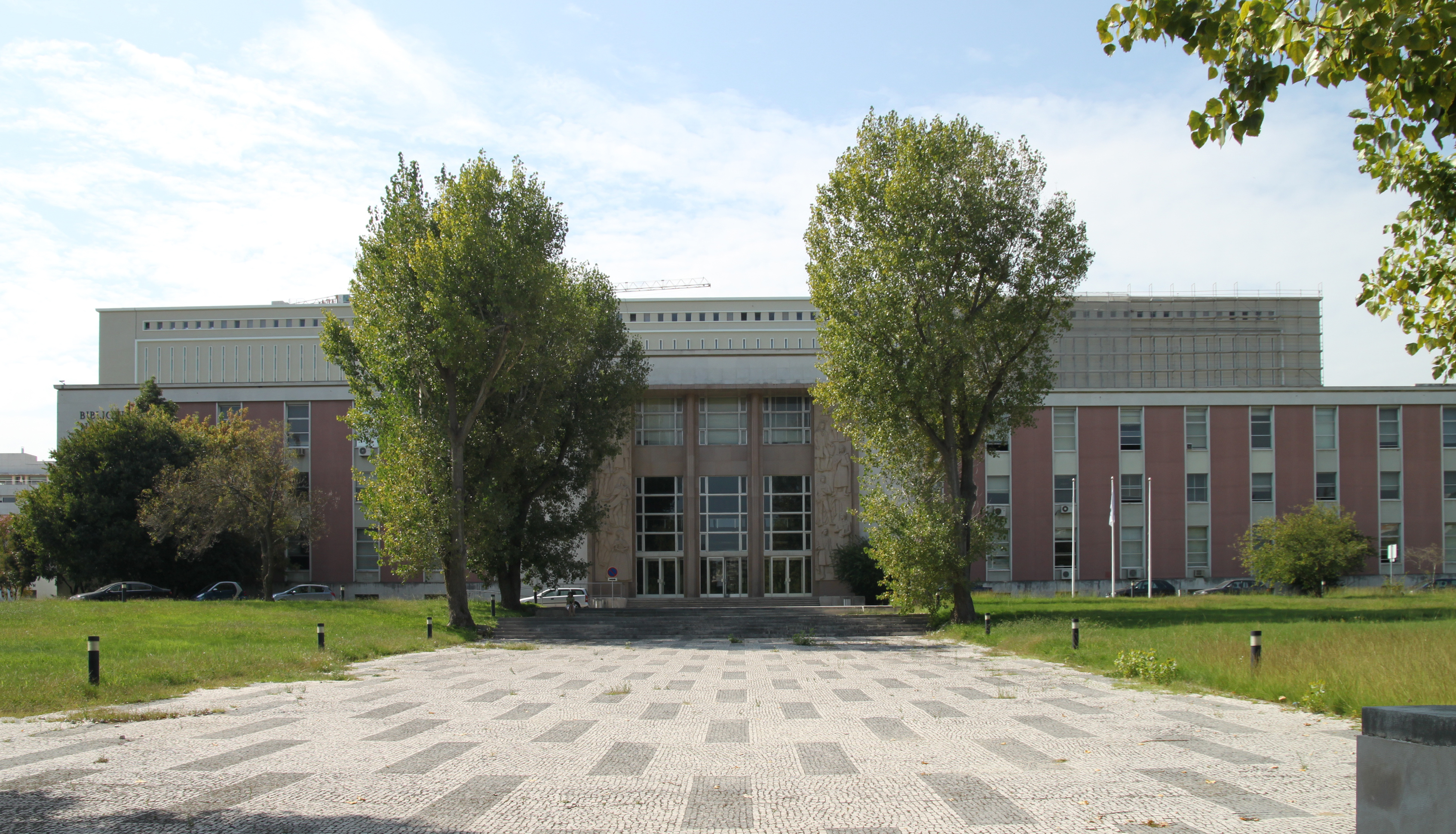 Biblioteca Nacional de Portugal e jardins envolventes, incluindo o património integrado This file was uploaded for Wiki Loves Monuments in Portugal with the unique identifier 7389721.